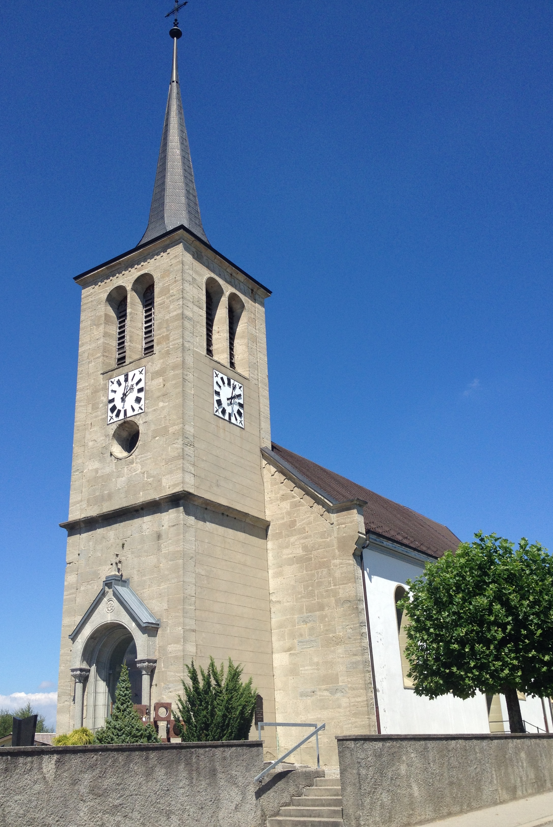 L'église de Châtonnaye dans le canton de Fribourg en Suisse.